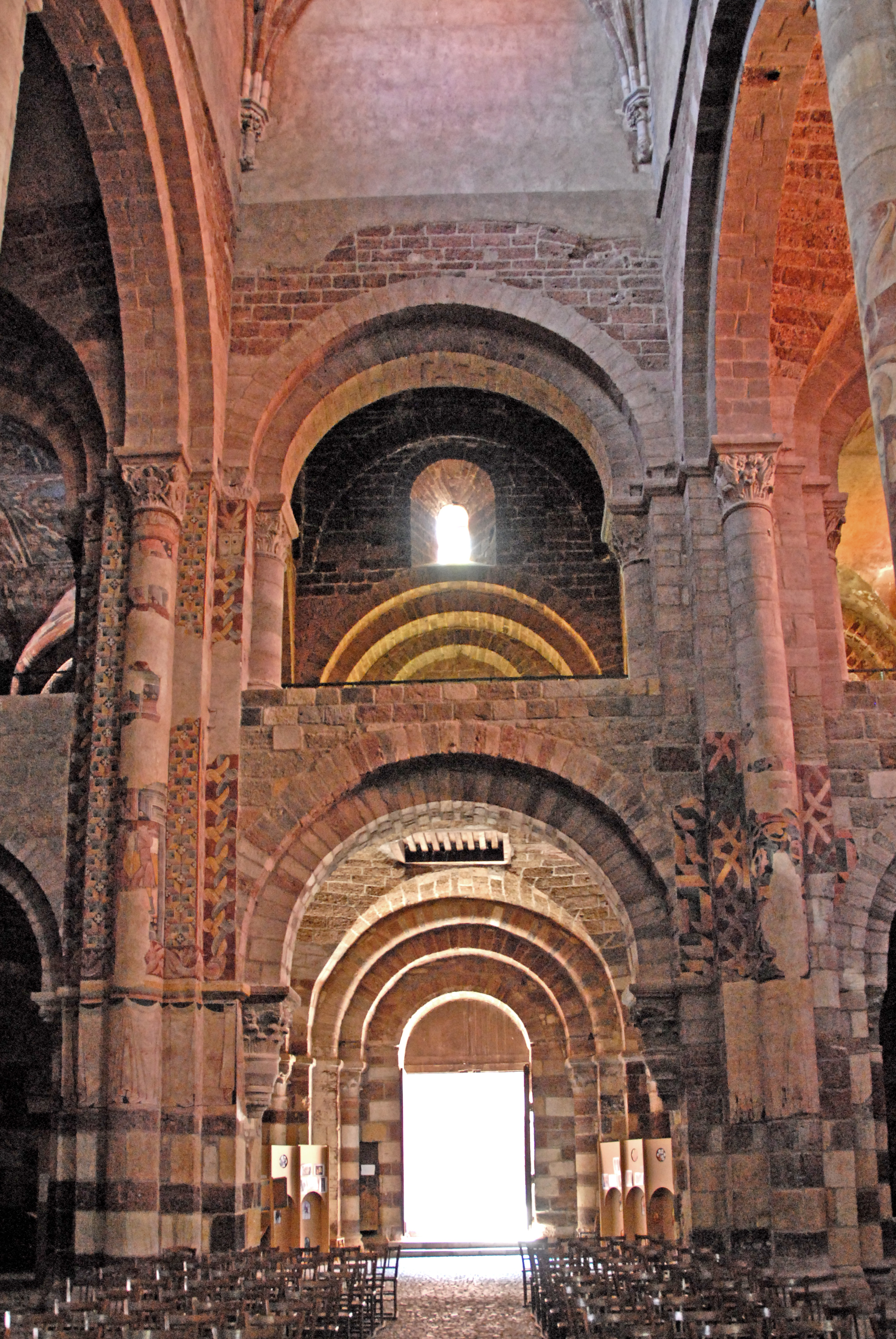 Saint-Julien Brioude, Mittelschiff, Joch 1, zum Narthex